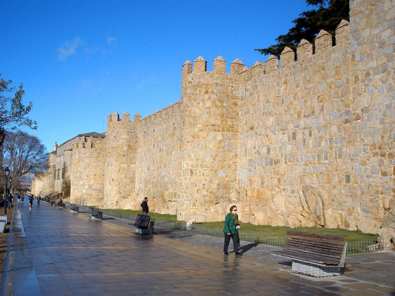 Avila - Murallas, Paseo del Rastro